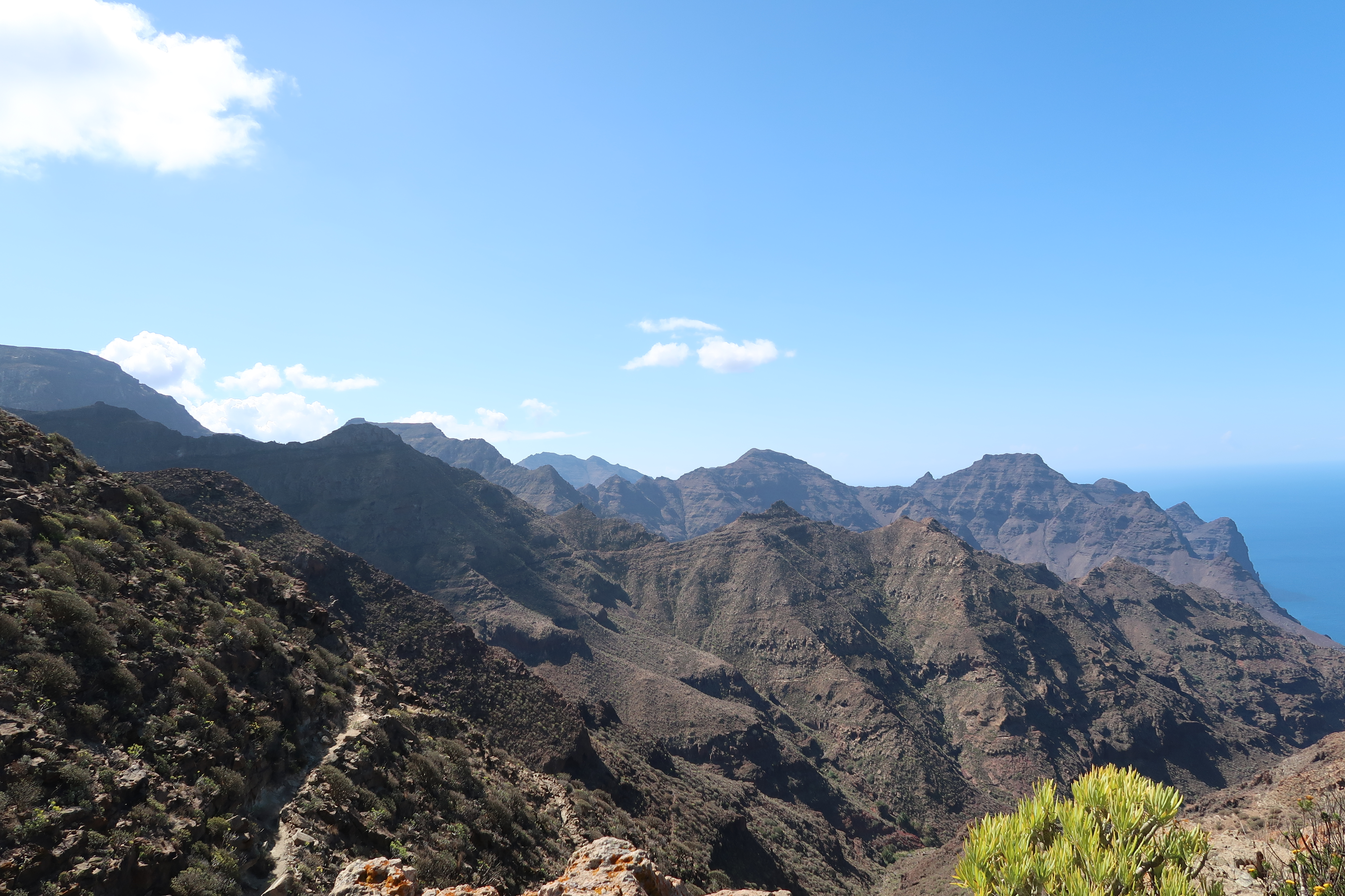 Güigüí This is a photography of a Special Area of Conservation in Spain with the ID: ES7010008. Natura2000 entry, EEA entry